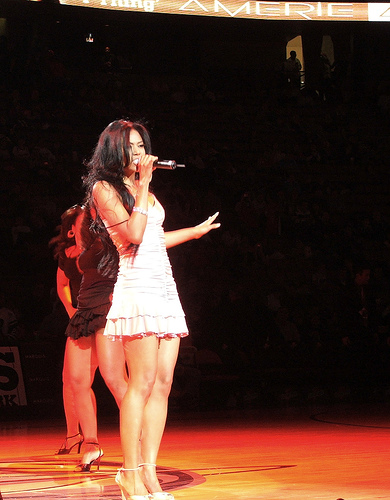 Singer Amerie in concert (Amerie Mi Marie Rogers)